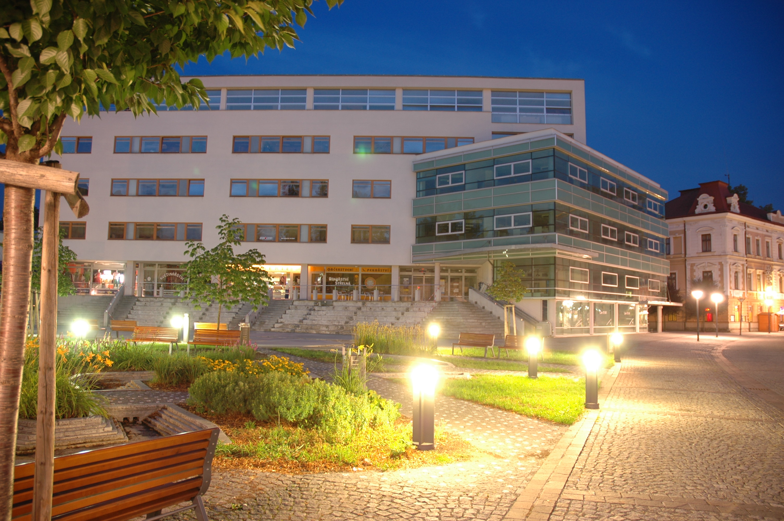 Budova č. p. 1356, Dolní náměstí, Vsetín